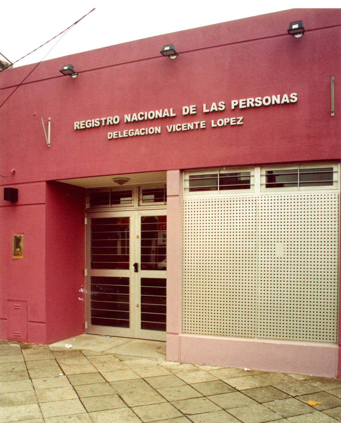 Delegación Vicente López - ReNaPer